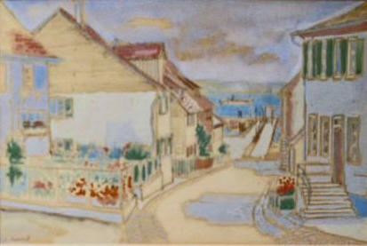 Schiffsstation in Gottlieben. Blick auf die Schiffsanlegestelle am Seerhein. Sichtgrösse 25,5x 37 cm